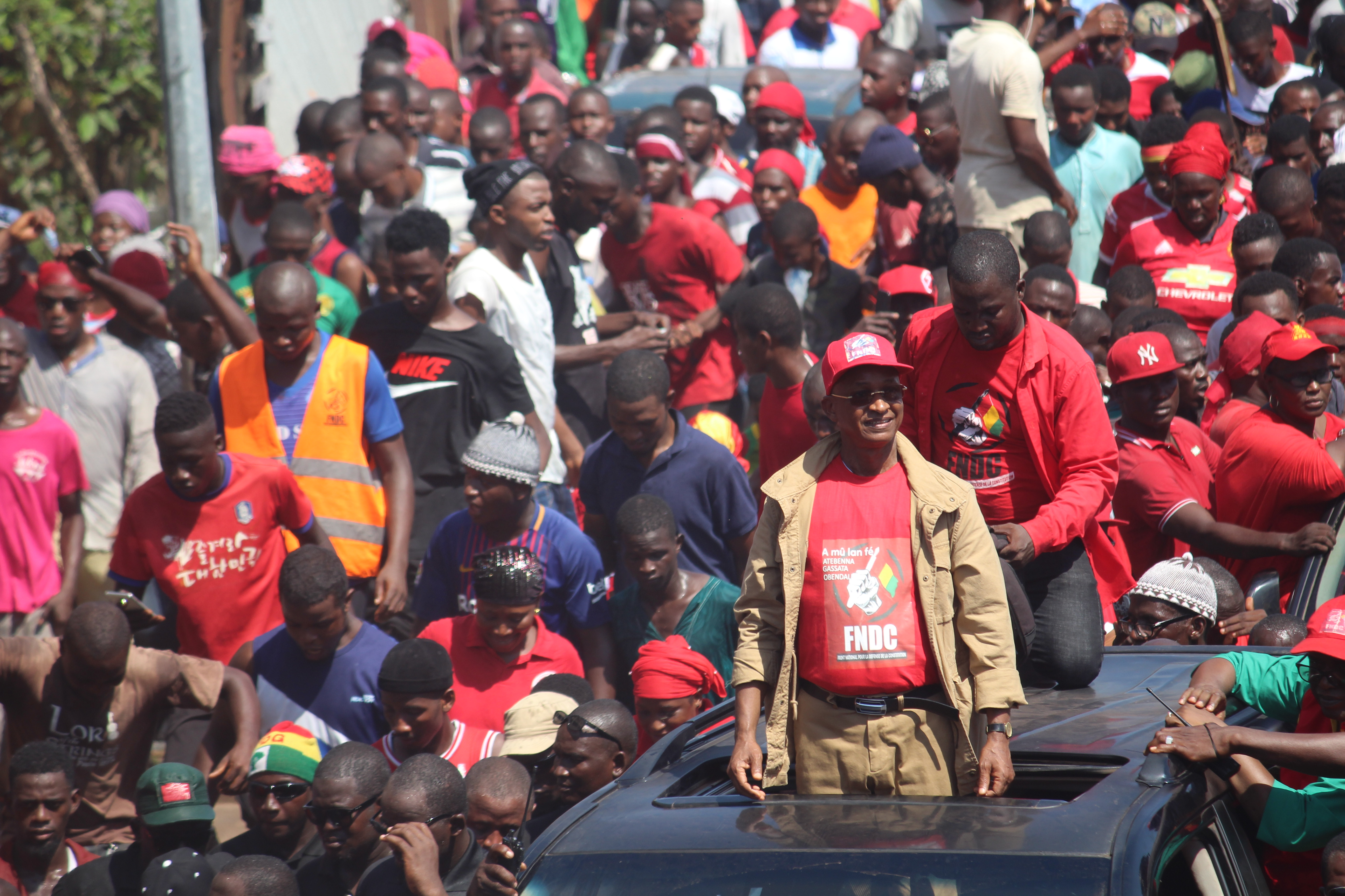 Cellou Dalein Diallo a la marche du FNDC This is an image with the theme "Africa on the Move or Transport" from: Guinea